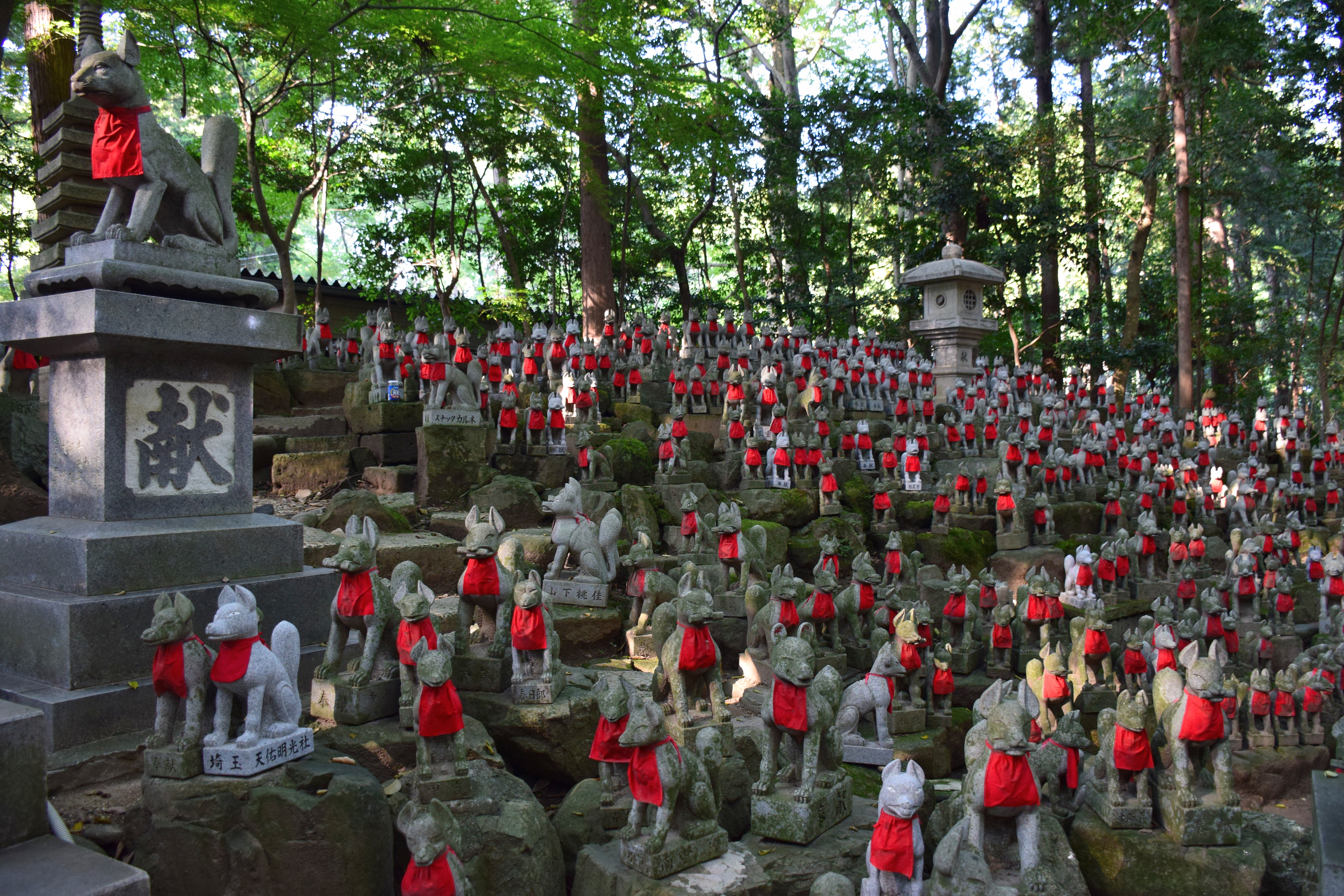 豊川稲荷霊狐塚